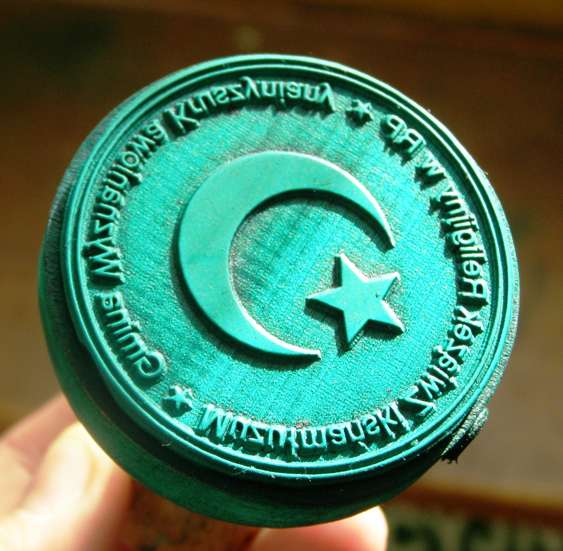 Pieczęć Muzułmańskiego Związku Religijnego w RP - Gminy Wyznaniowej Kruszyniany